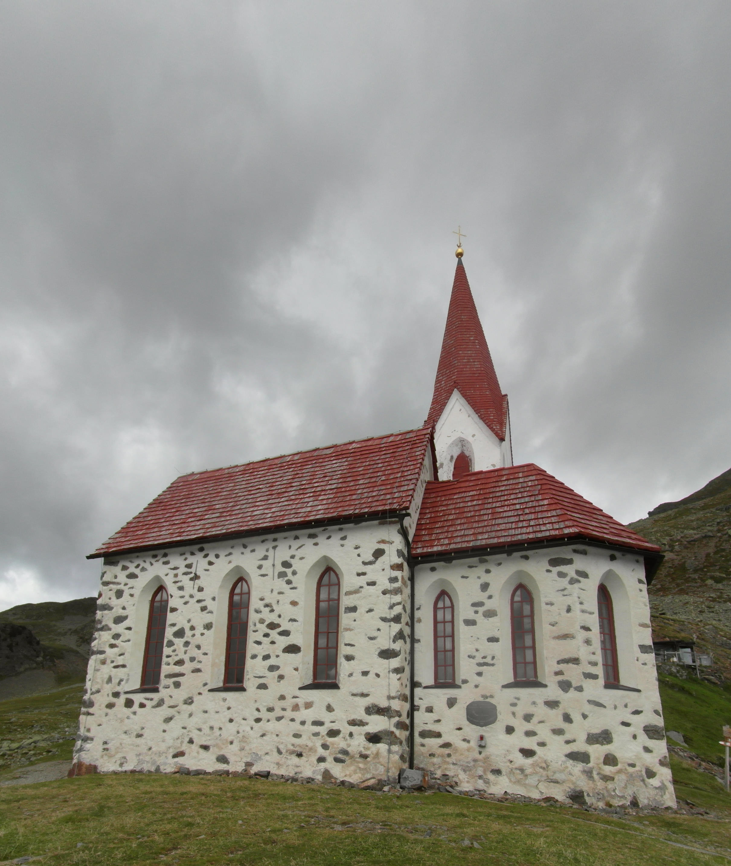 Chiesa Santa Croce di Lazfons